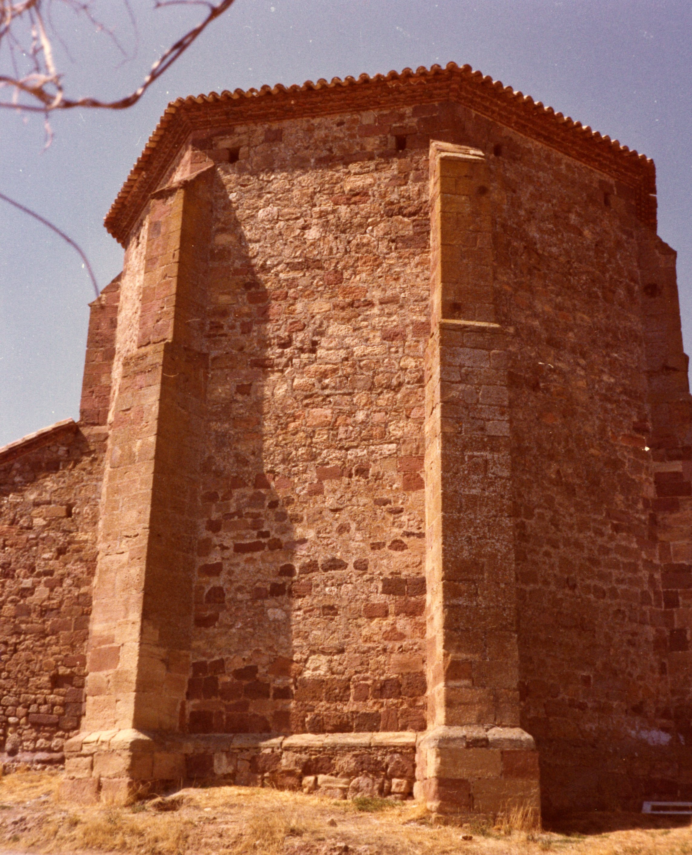 Ábside de la iglesia parroquial de Malanquilla